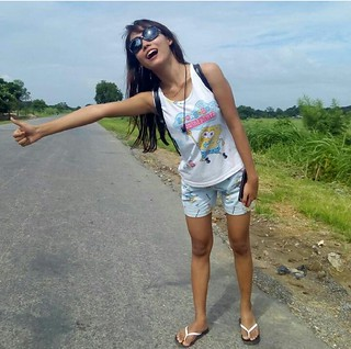 Trampende Frau auf einer Landstrasse